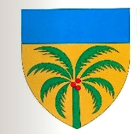 Le Blason de la ville de Cocobeach au Gabon